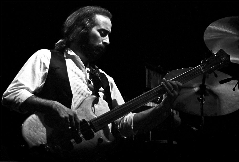 John McVie (Fleetwood Mac) en concert à Zürich en 1980.